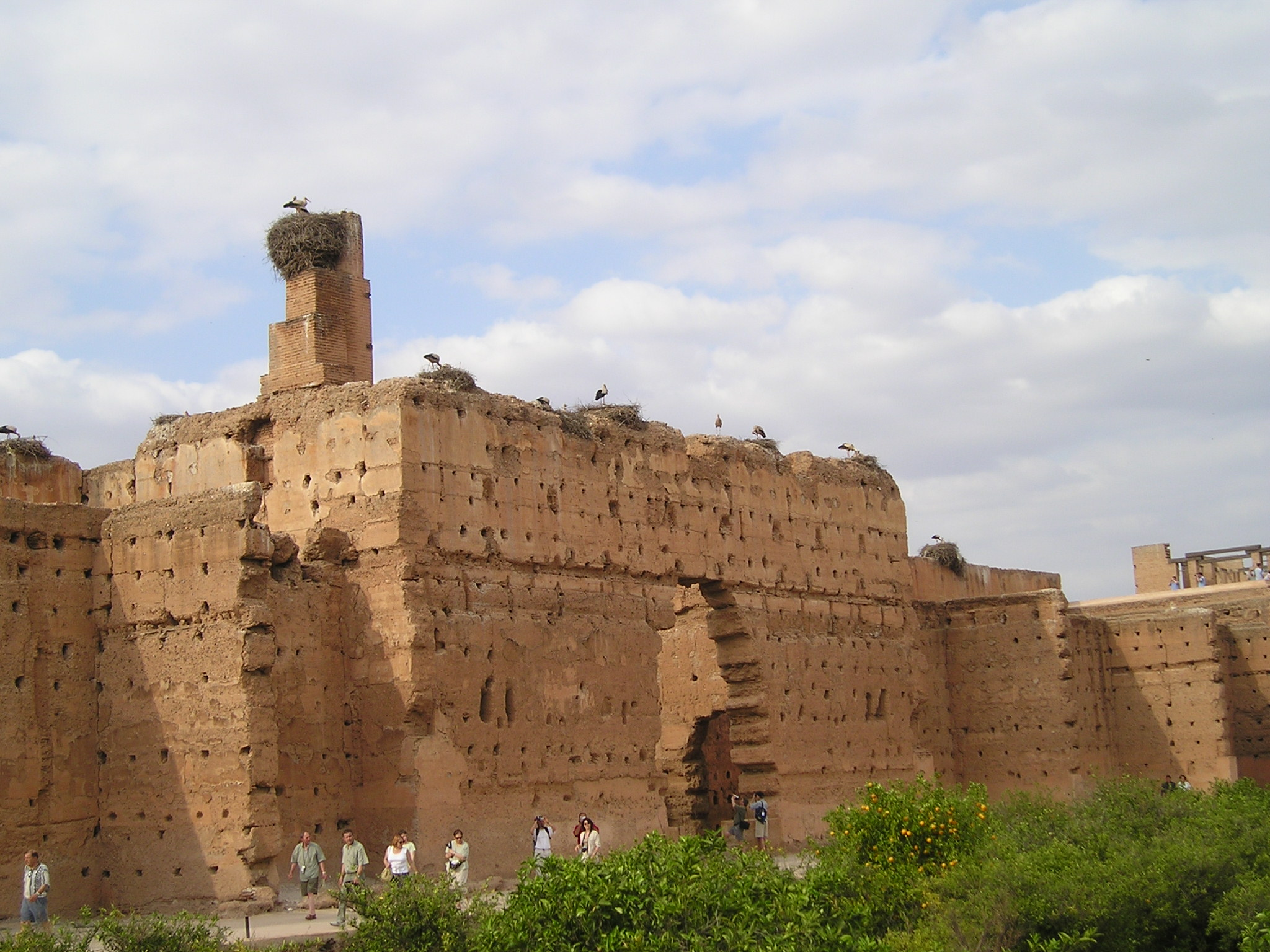 El Badi Palace